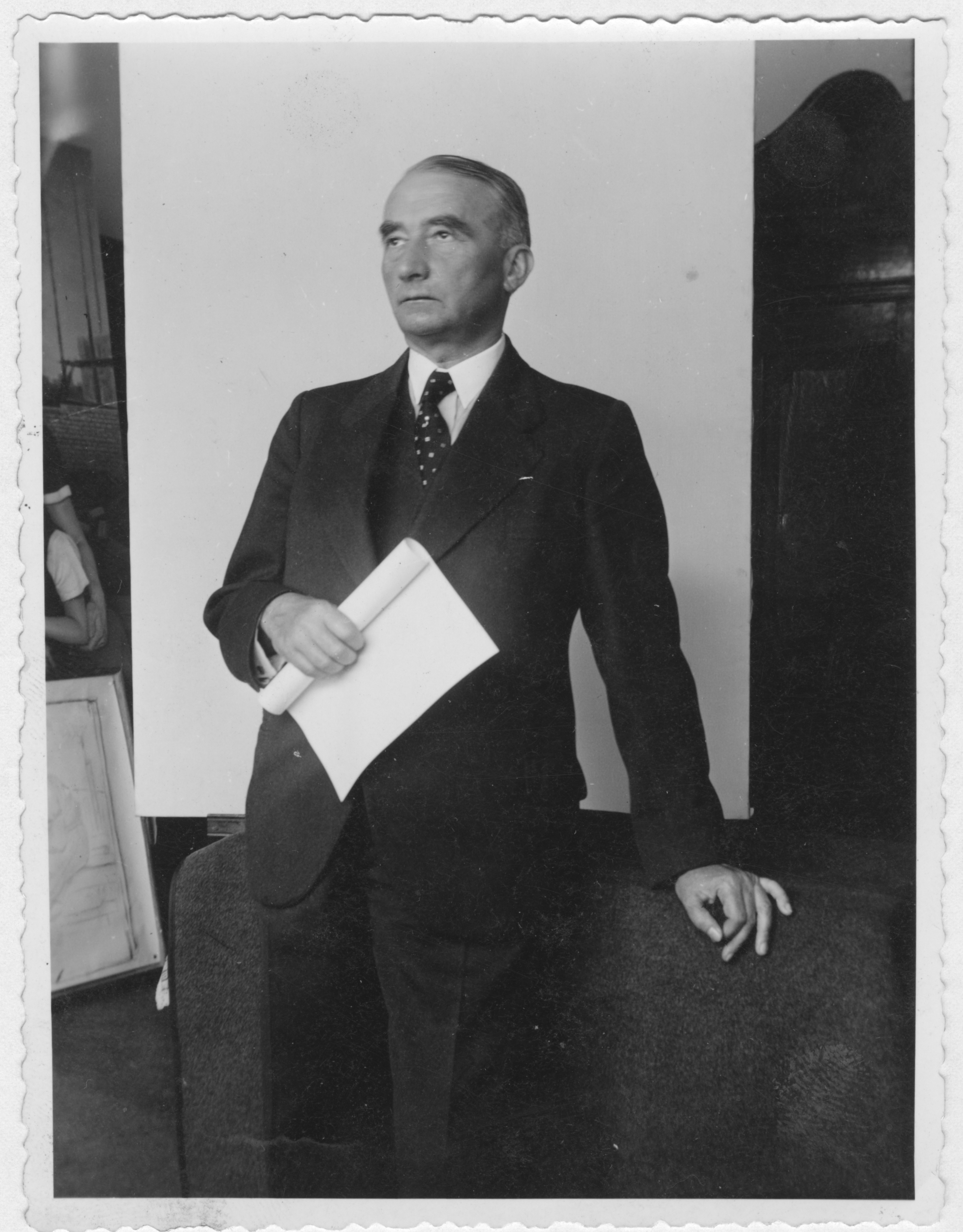 Deitsch: Das Bild von Arthur Menge, dem Oberbürgermeister von Hannover, wurde vom Maler Adolf Wissel in seinem Atelier aufgenommen und diente als Vorlage für das Portrait von Arthur Menge, dass im Rathaus Hannover hängt.